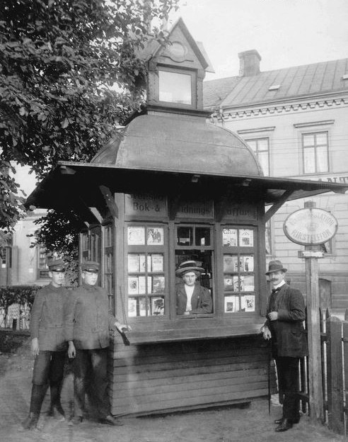 Urtypen av en Pressbyråkiosk i Hässleholm